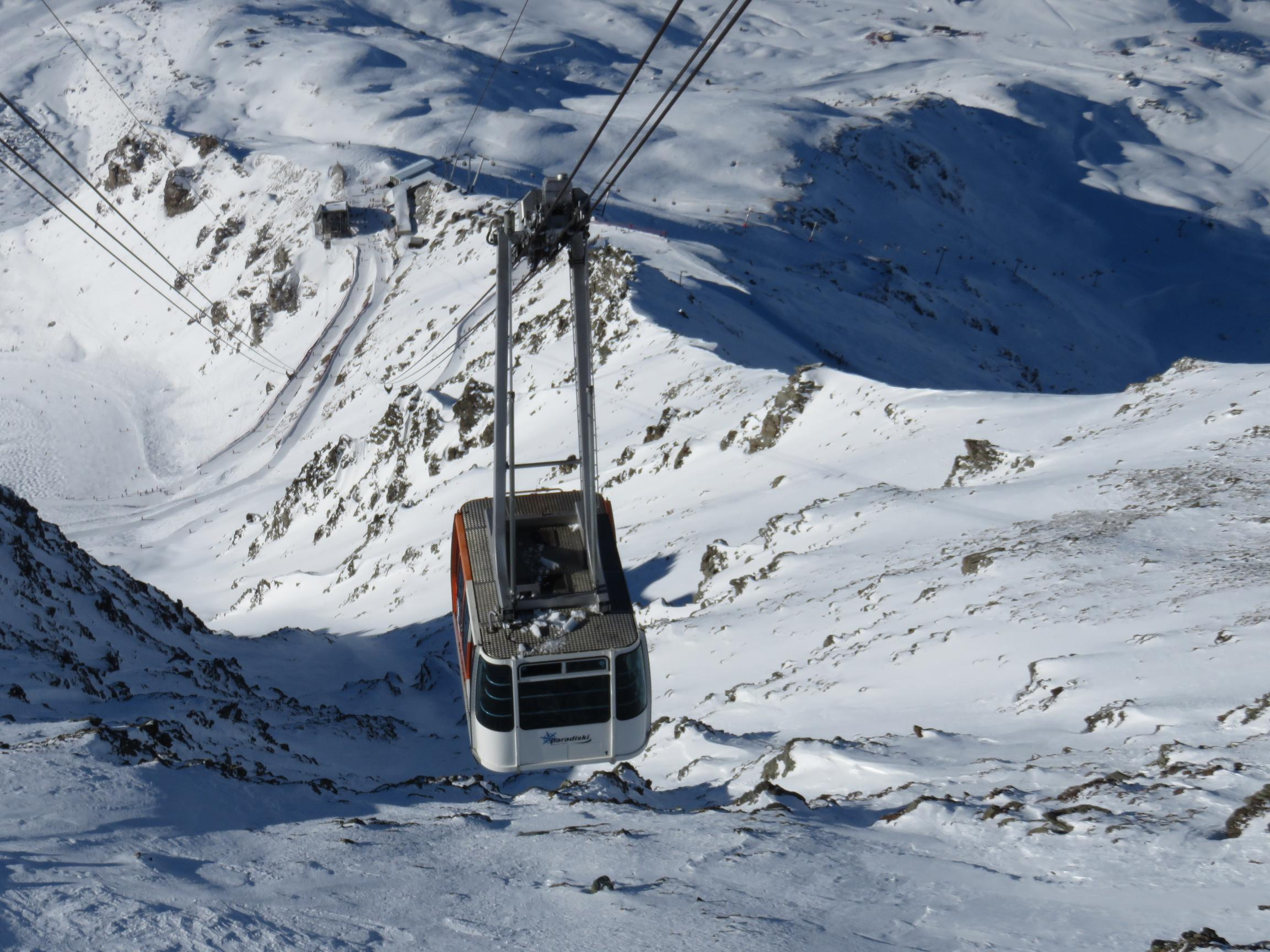 Telepherique Aiguille Rouge, Les Arc 2000